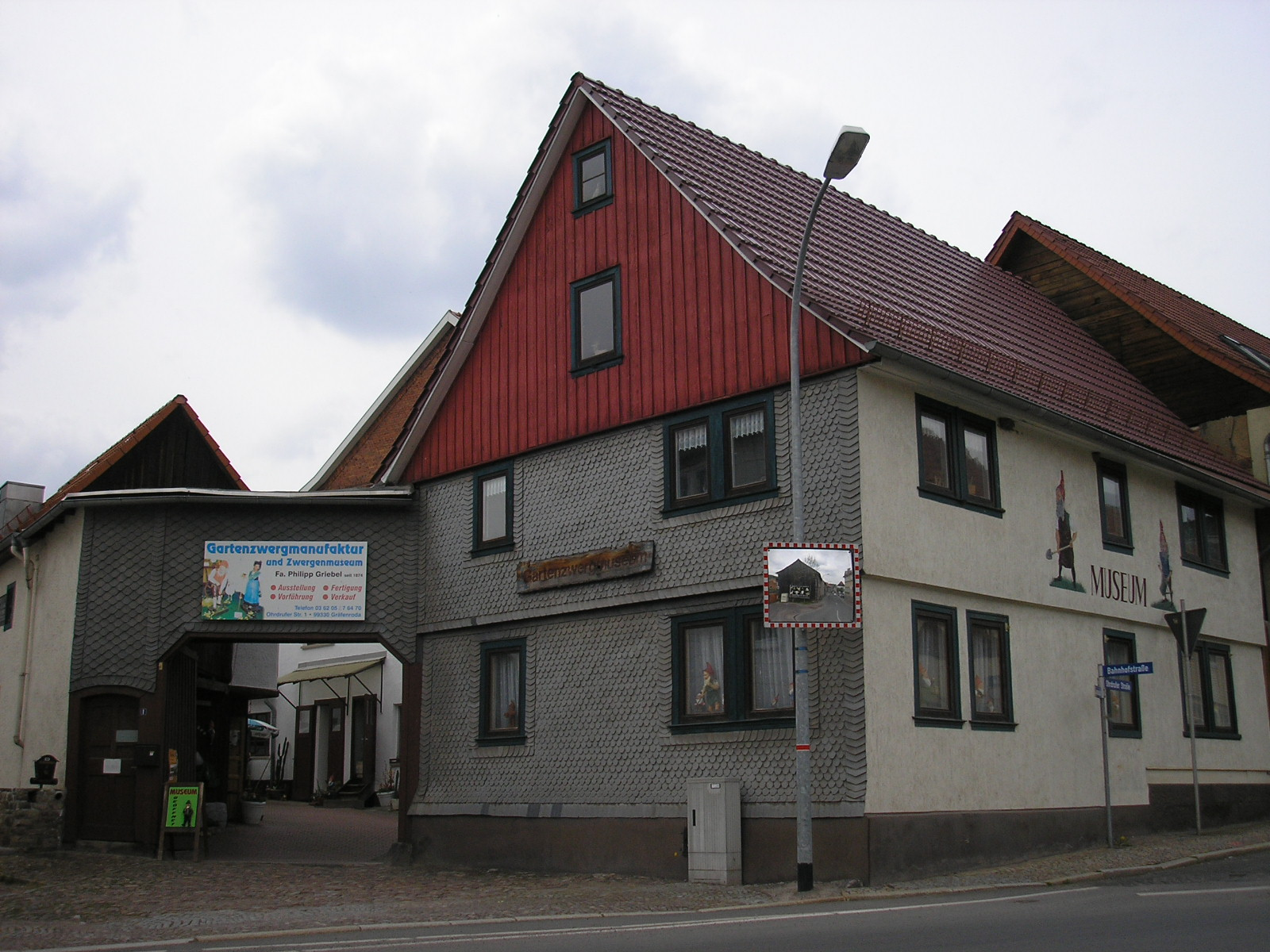 Das Gartenzwergmuseum in Gräfenroda (Thüringen).